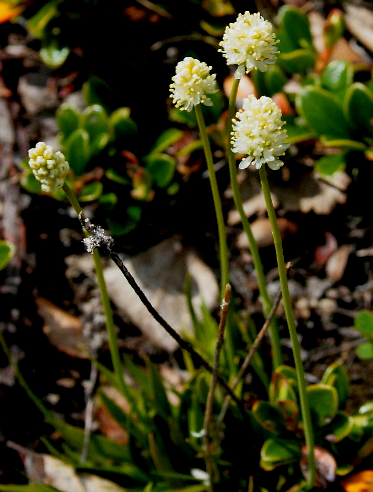 Auf_dem_Lavafeld_Dimmuborgir: Kleine Simsenlilie (Tofieldia pusilla)